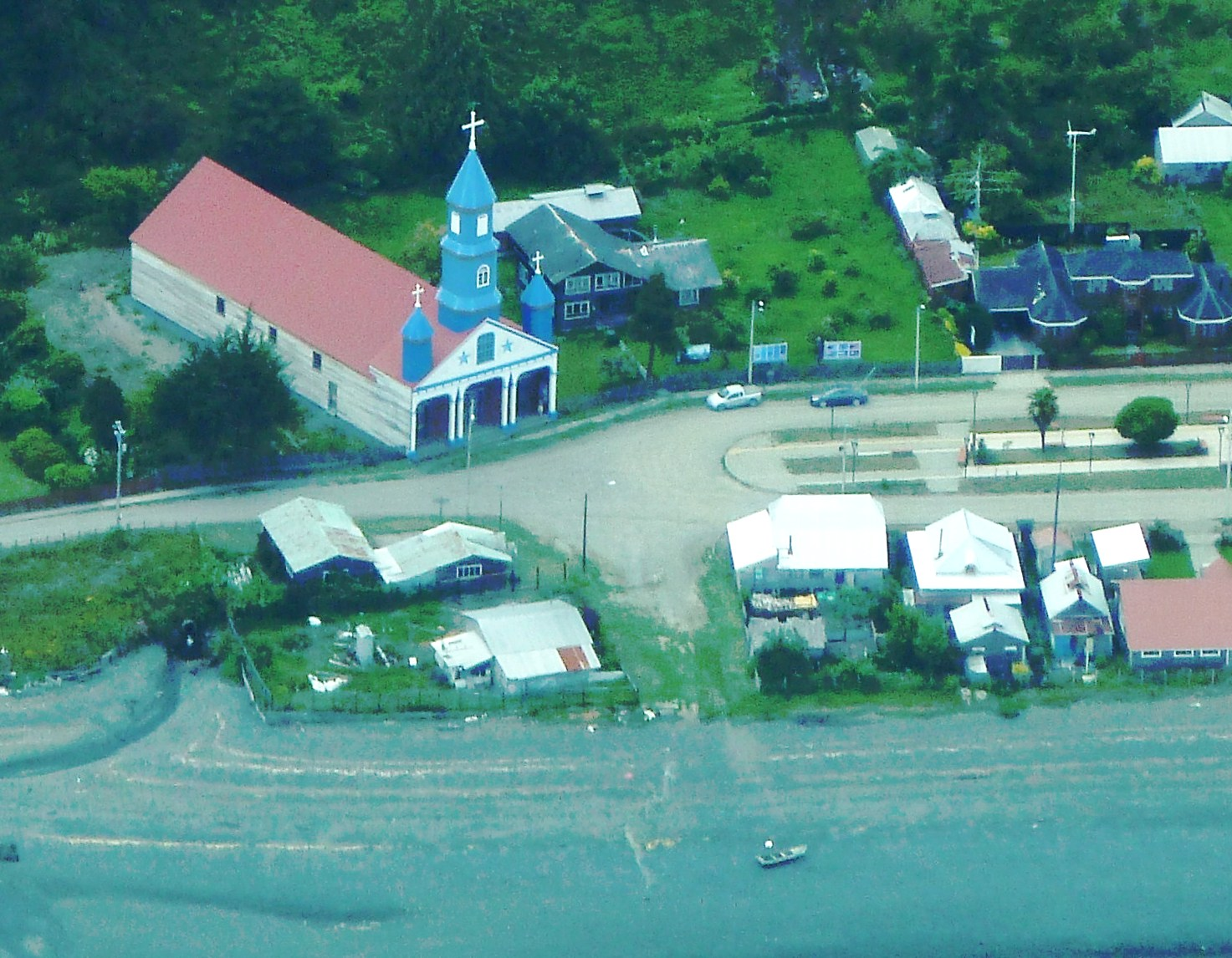 Situada en la comuna de Dalcahue, en la isla de Chiloé, Chile. una de las 16 iglesias declaradas Patrimonio de la Humanidad construidas en madera